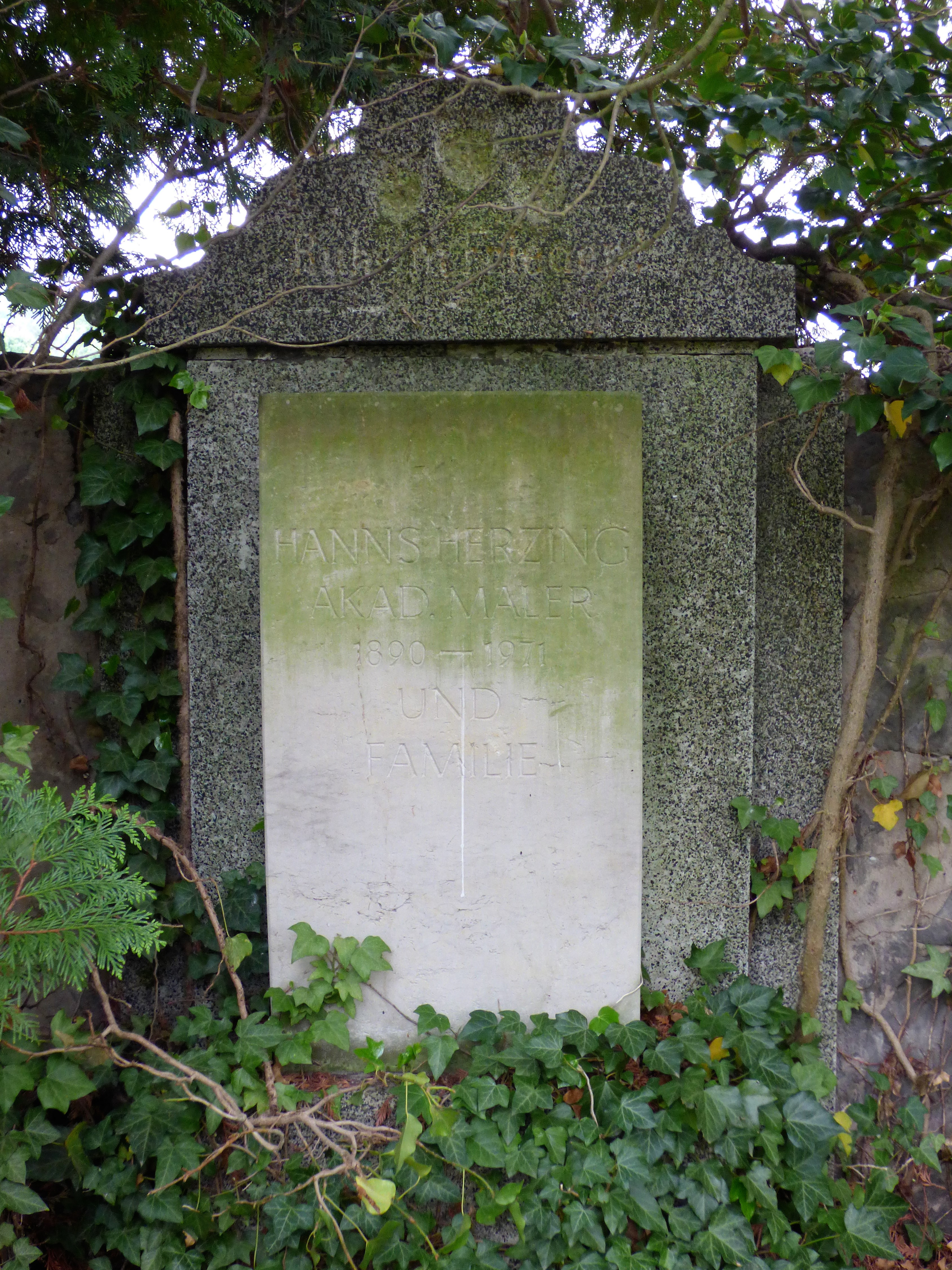 Grabmal des Malers Hanns Herzing (1871-1971) und seiner Familie auf dem Friedhof in Hosterwitz.